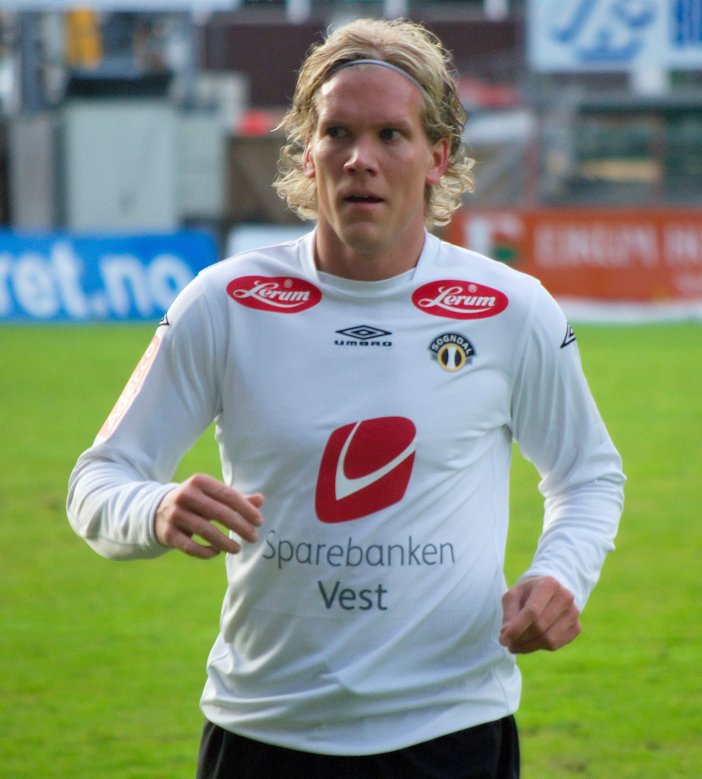 Lars Grorud